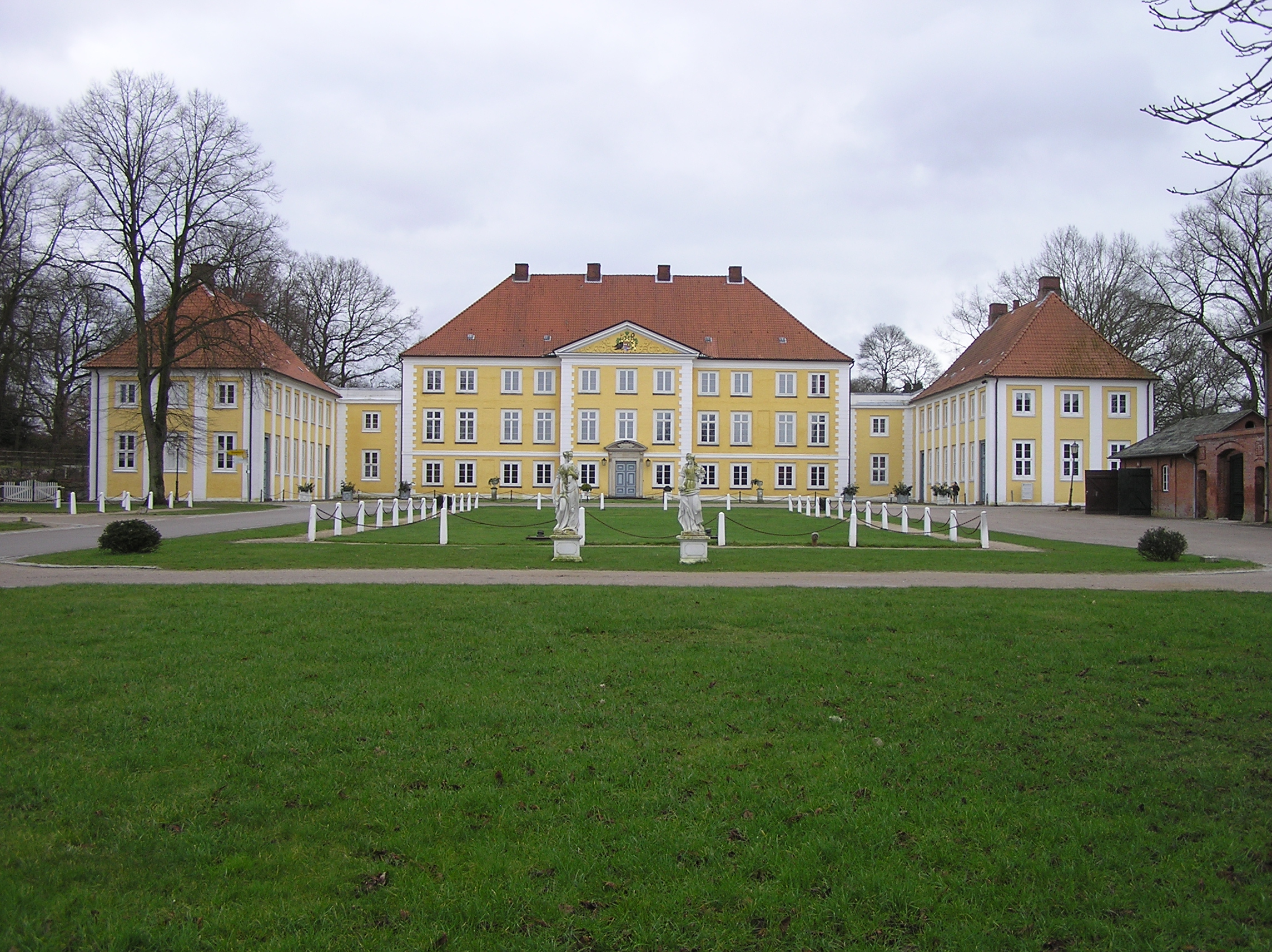 Gut Wotersen Herrenhaus